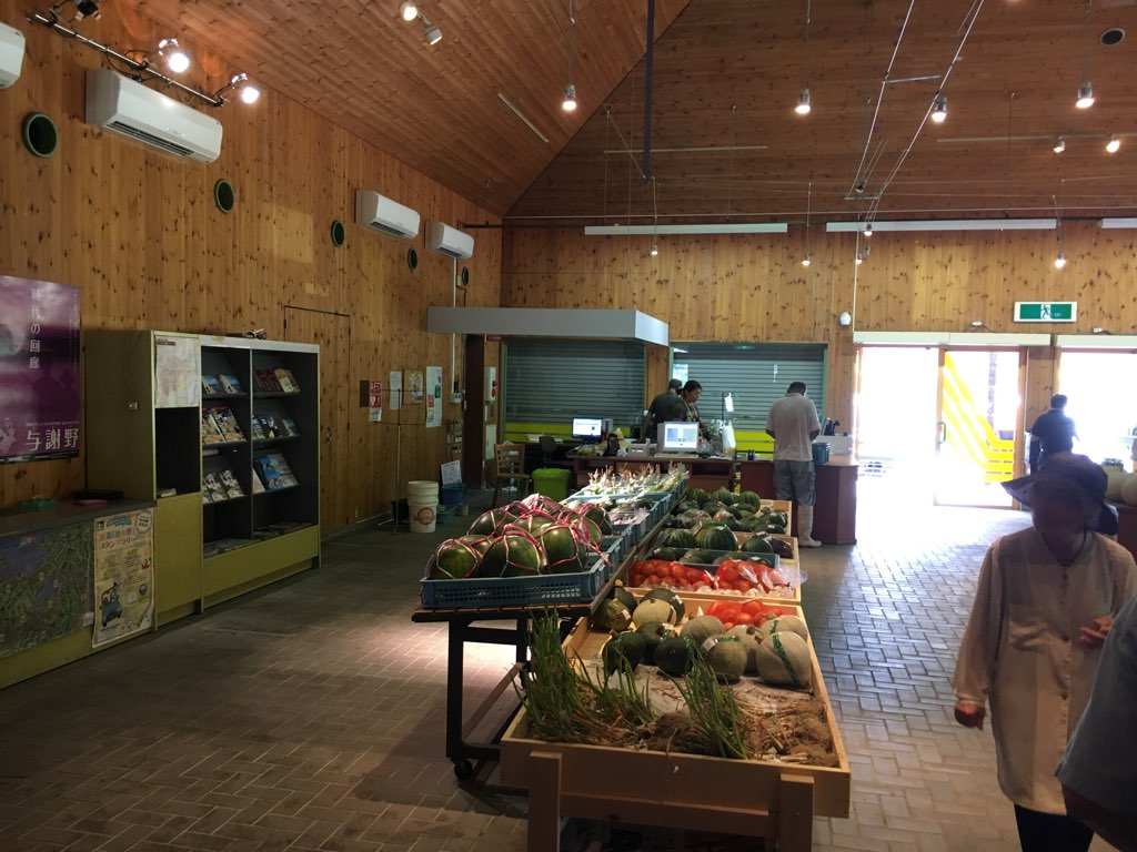 2017年8月20日撮影